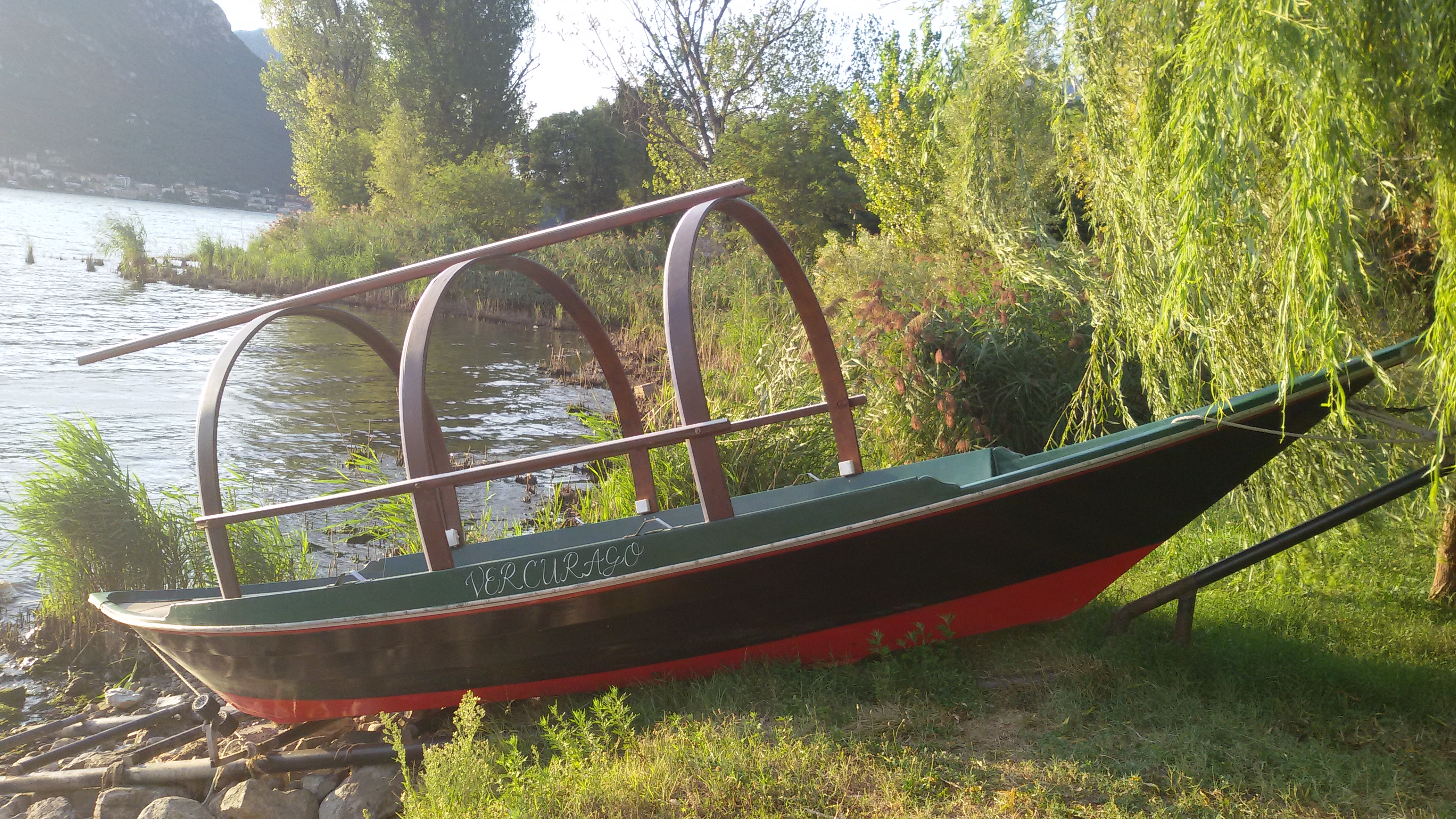 L'Imbarcazione lariana volgarmente chiamata Lucia del comune di Vercurago in sosta sulle sponde del lago di Garlate